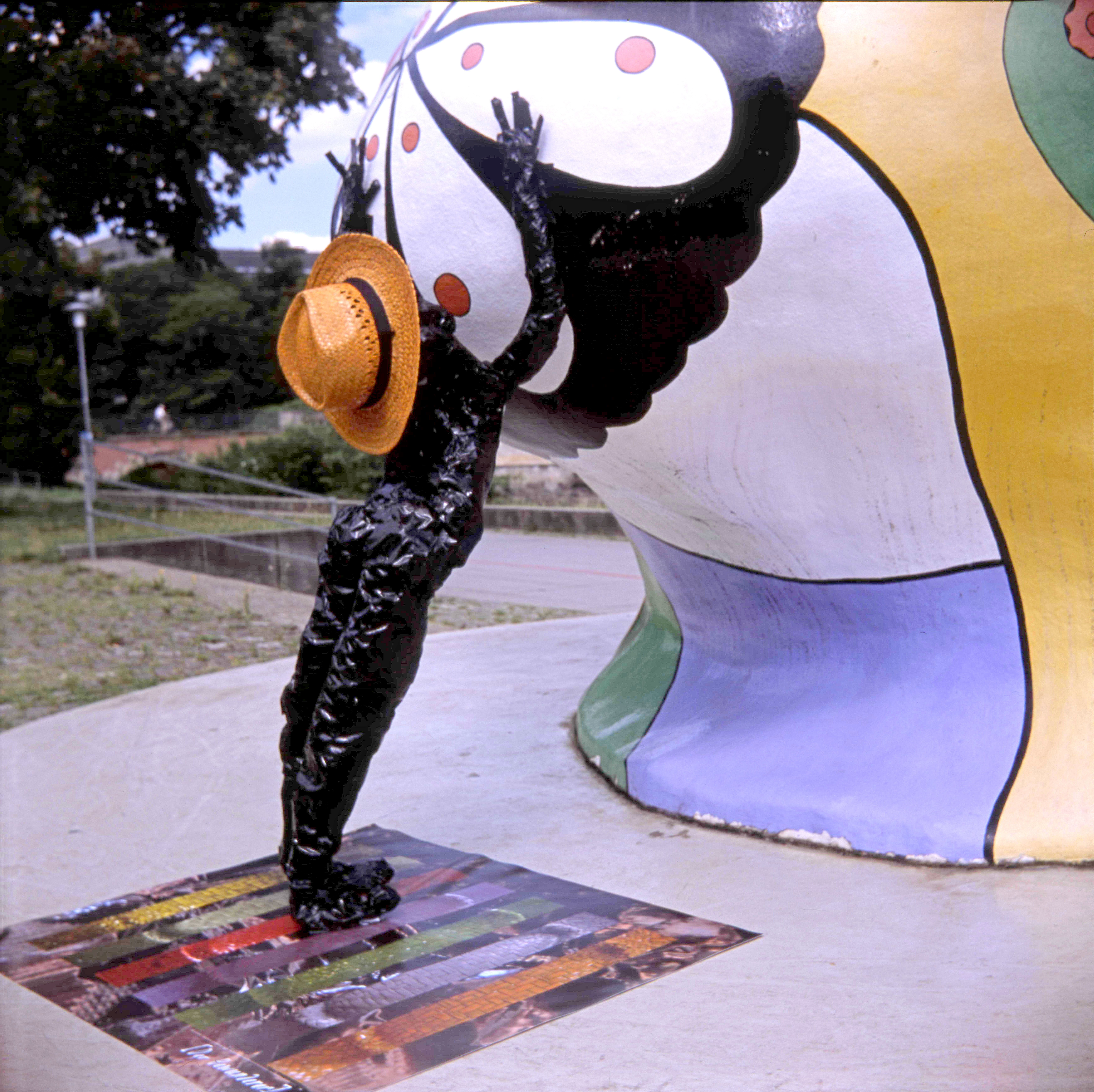 Kunstaktion von Nana Bastrup und Matvey Slavin als Enfants Terribles - Kinder der Louise B. in Hannover an den Nanas am Leibnizufer ...